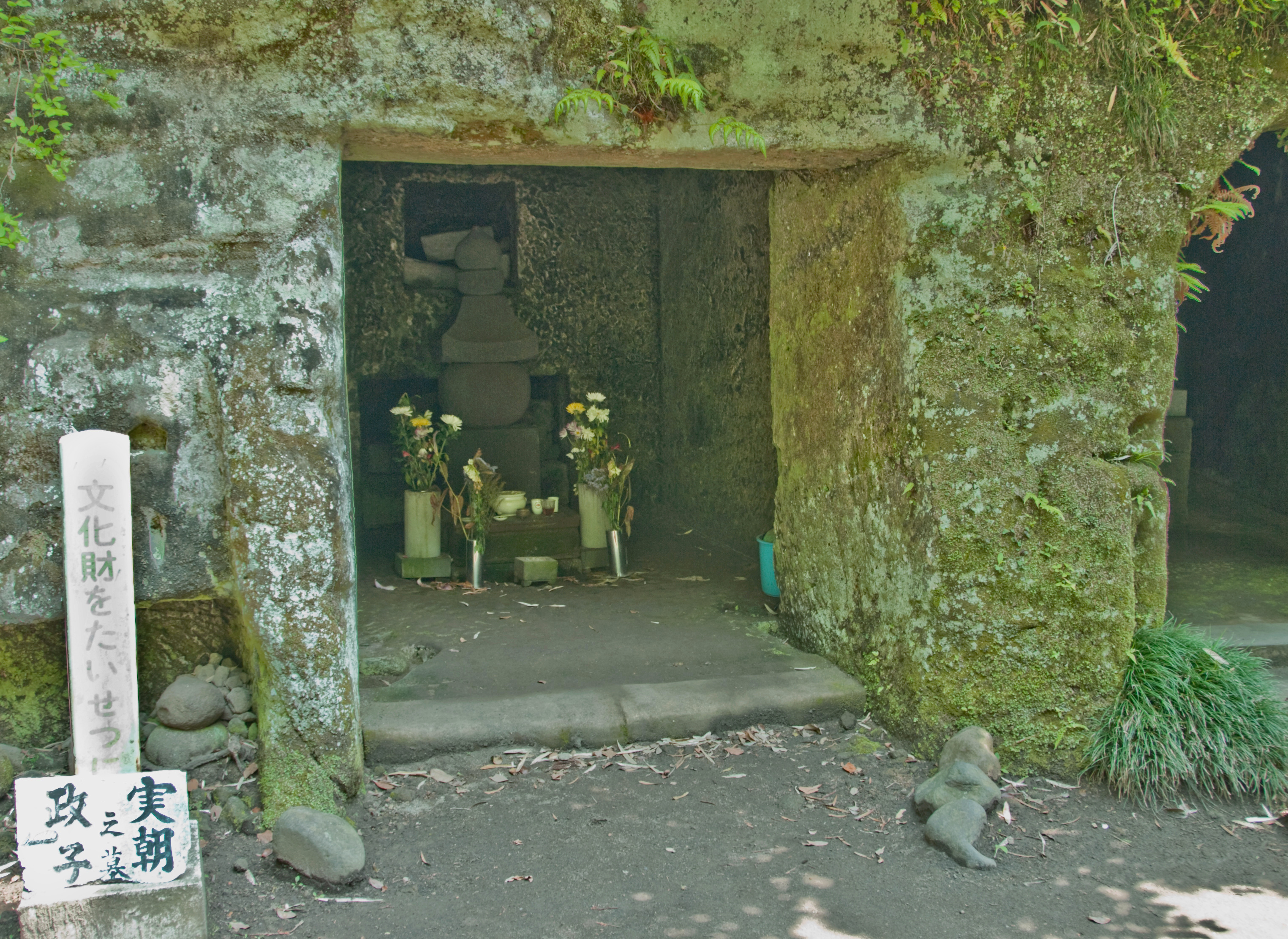 Minamoto no Sanetomo(源実朝)'s cenotaph at Jufuku-ji, Kamakura